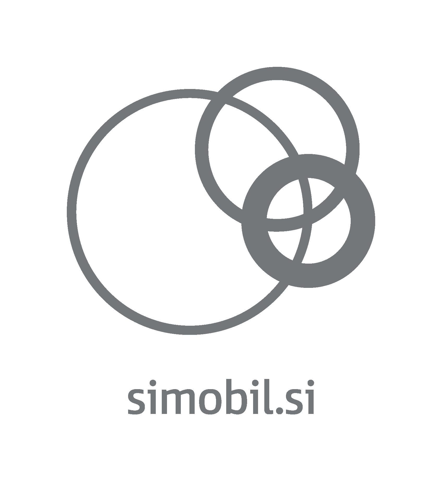 Si.mobil logotip